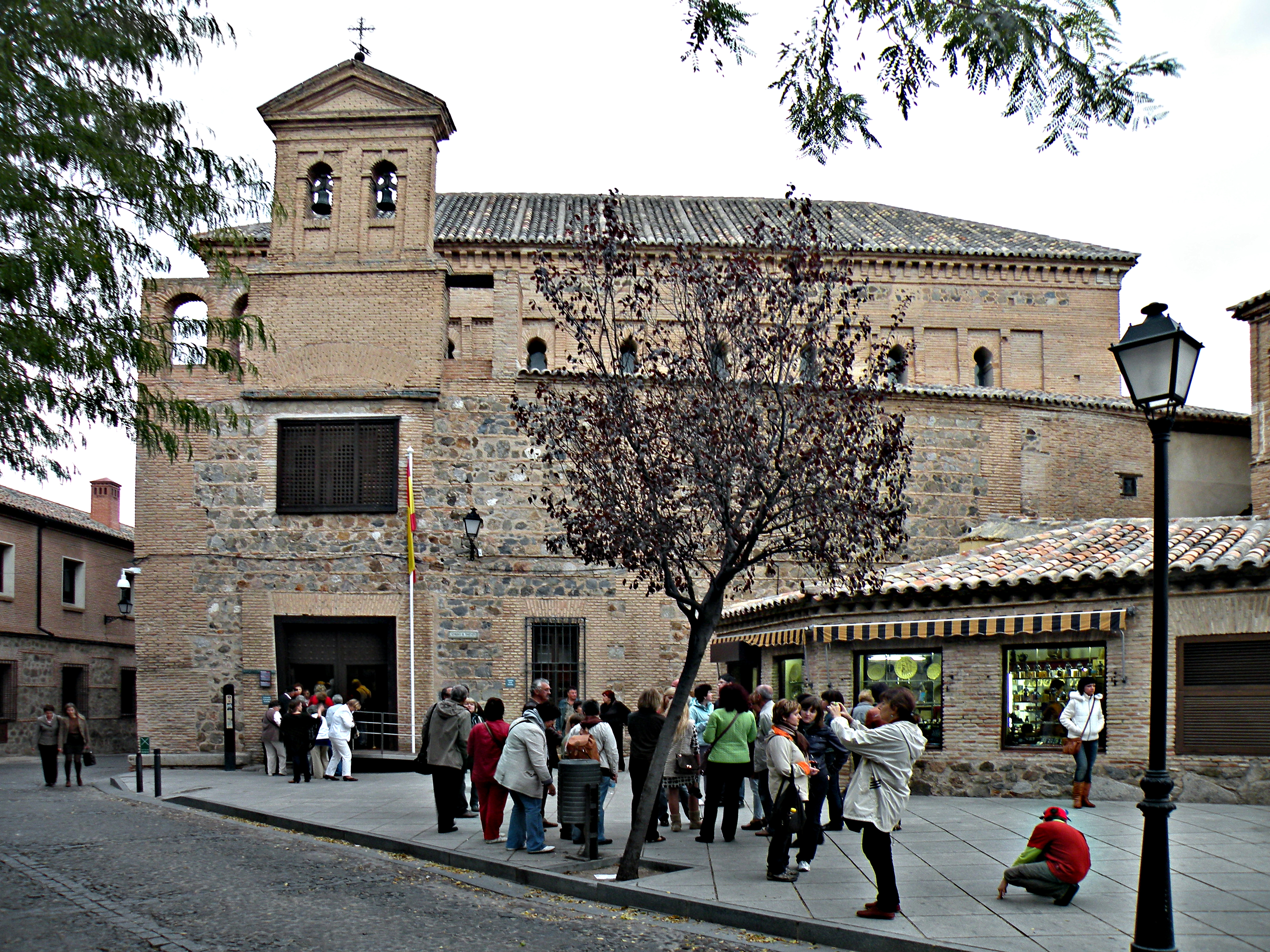 Synagoge del Transito in Toledo (XIV сentury).